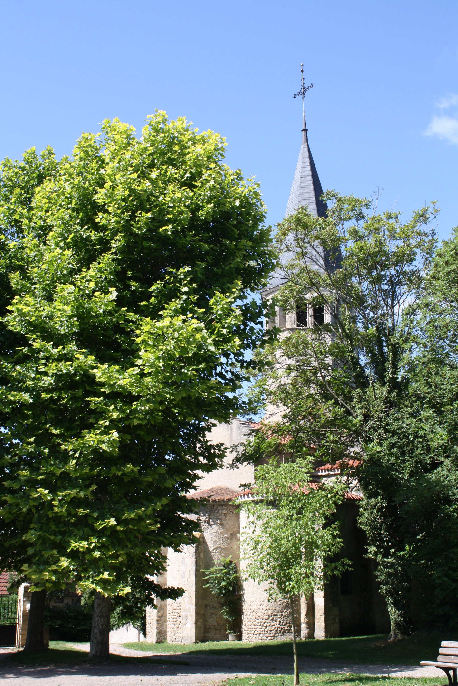 Eglise Saint Sulpice à Langy